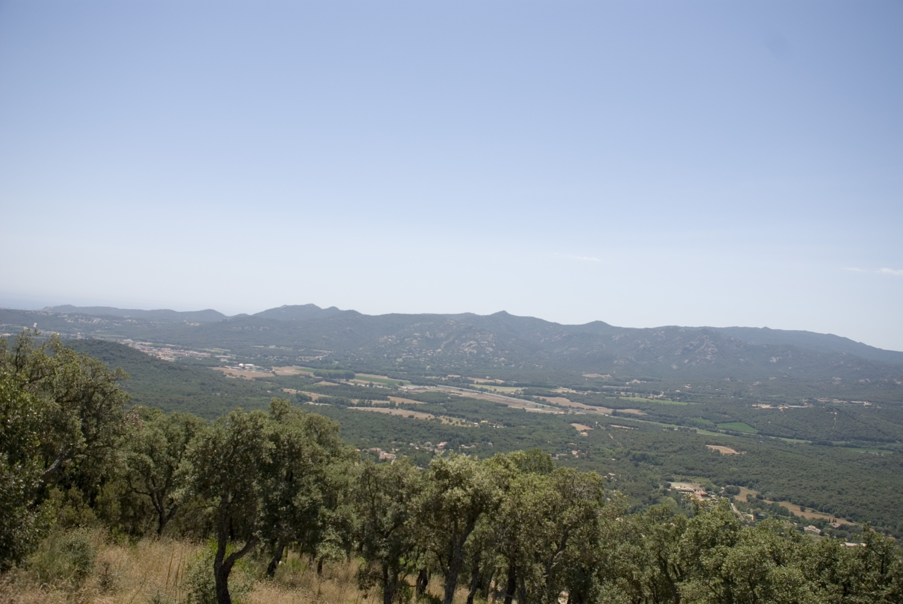 La Vall d'Aro des de Romanyà de la Selva, CTCamera data Camera Nikon D80 Lens Nikon AF-S DX 18-135 mm Focal length 20 mm Aperture f/3.5 Exposure time 1000 s Sensivity ISO 100